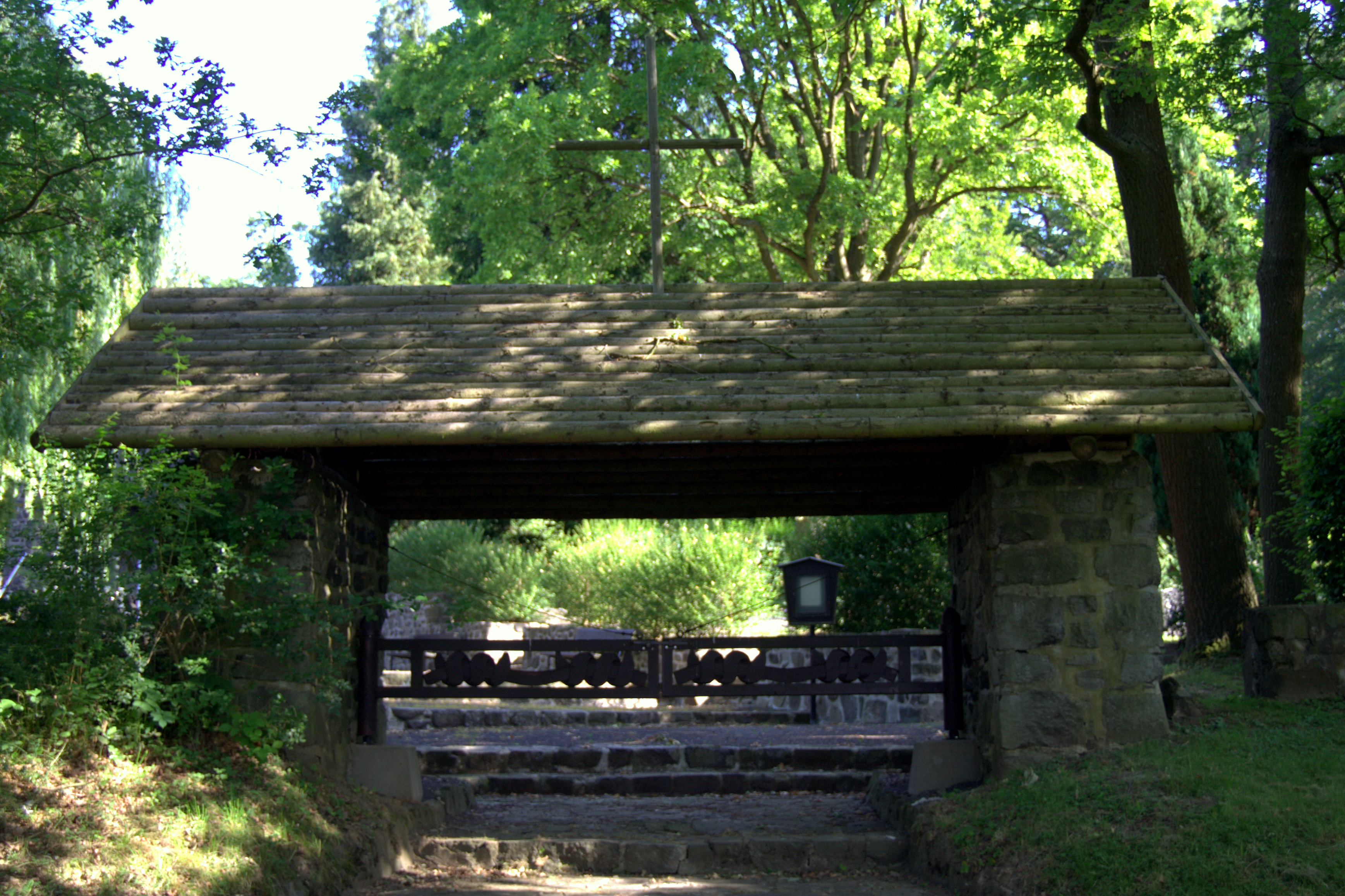 Das Eingangstor zum ehemaligen Friedhof des Stalag IX A Ziegenhain und zum heutigen Gemeindefriedhof Trutzhain. Das Eingangstor wurde zwischen 1940 und 1945 von unbekannten französischen Kriegsgefangenen angefertigt